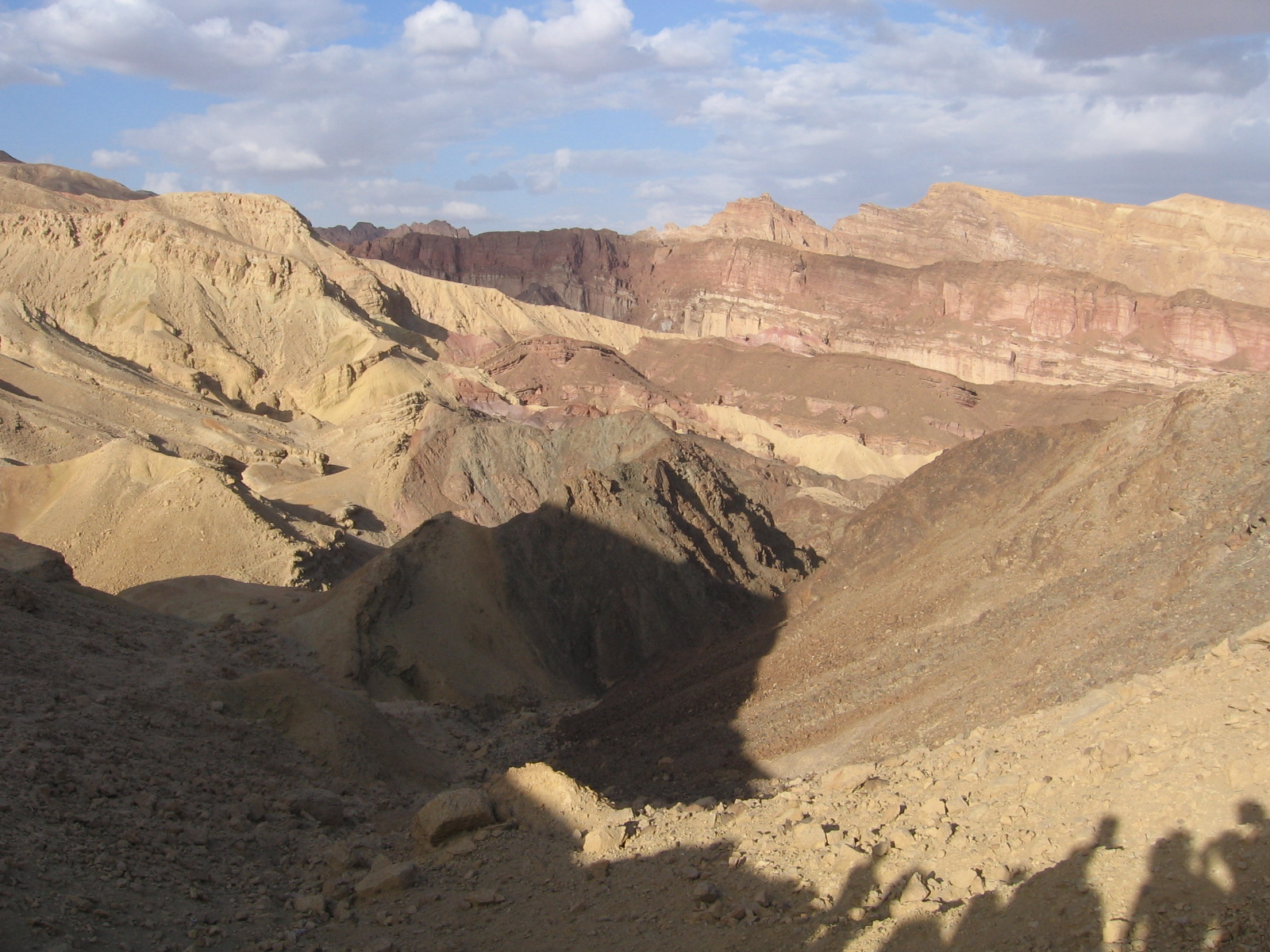 Eilat Monutains, Israel